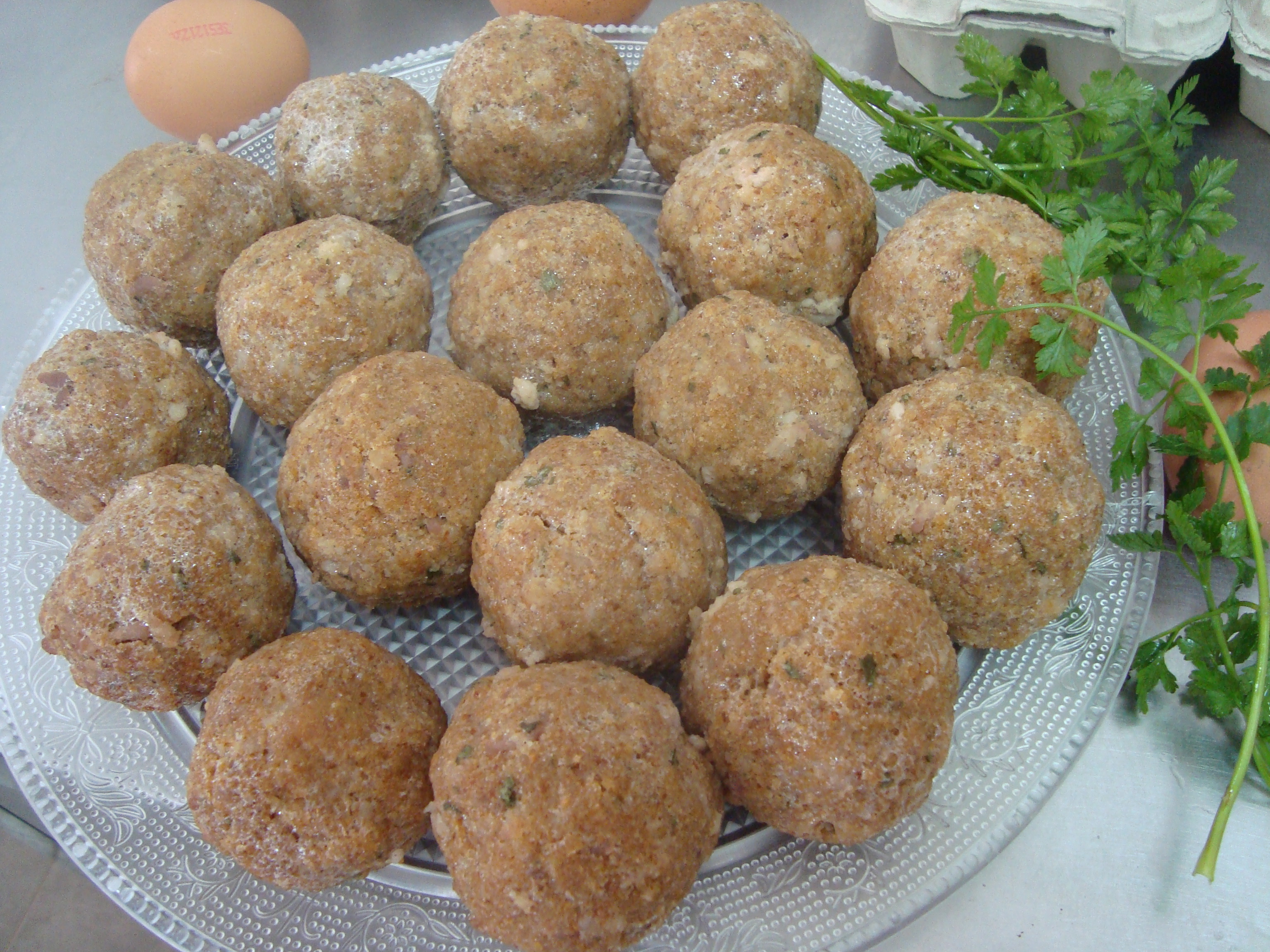 Pelotas de carne, típicas para la paella de Carnaval y Navidad.